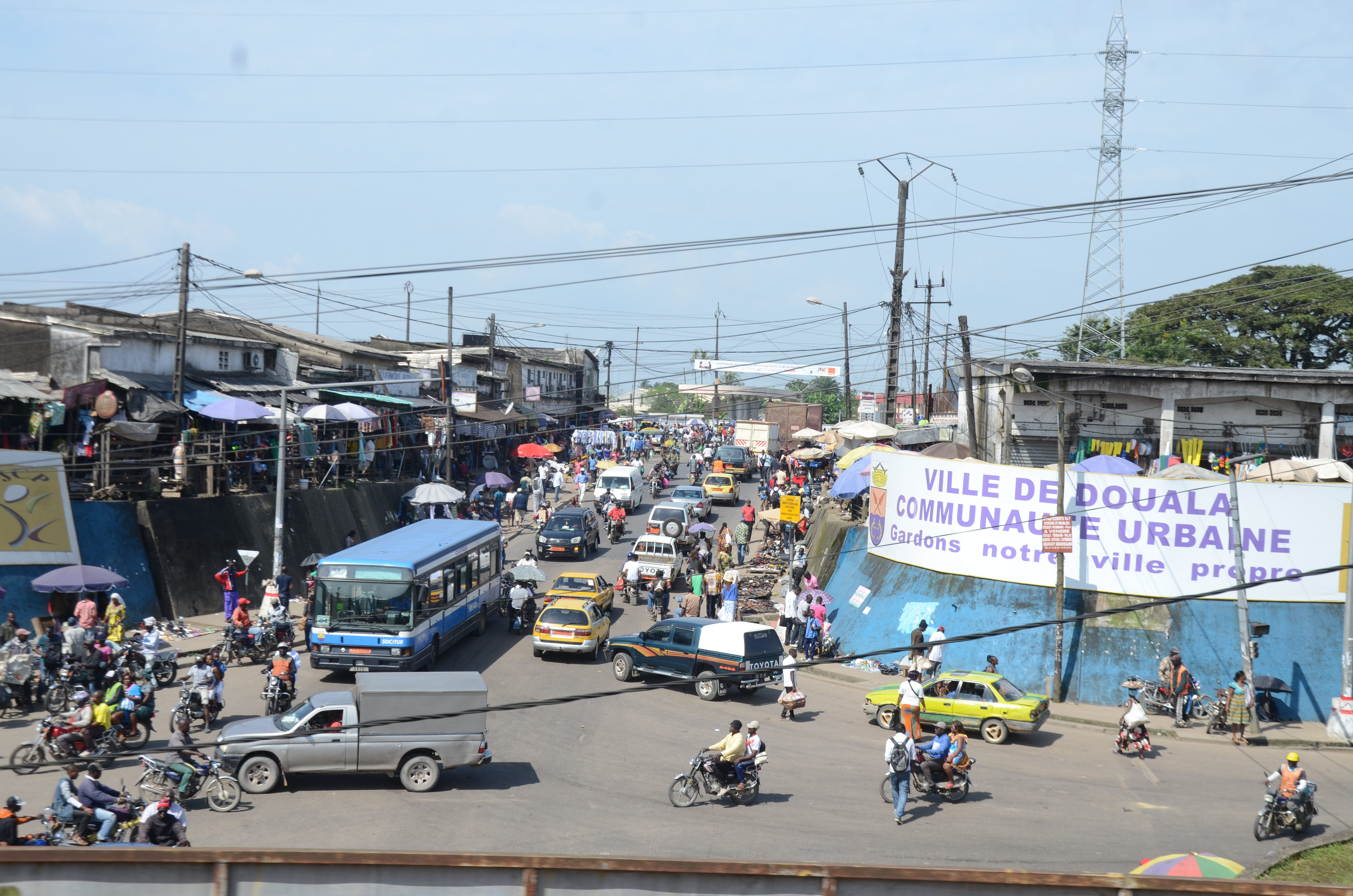 Transporteurs de differents type de véhicules au carrefour Ndokoti à Douala This is an image of "African people at work" from Cameroon